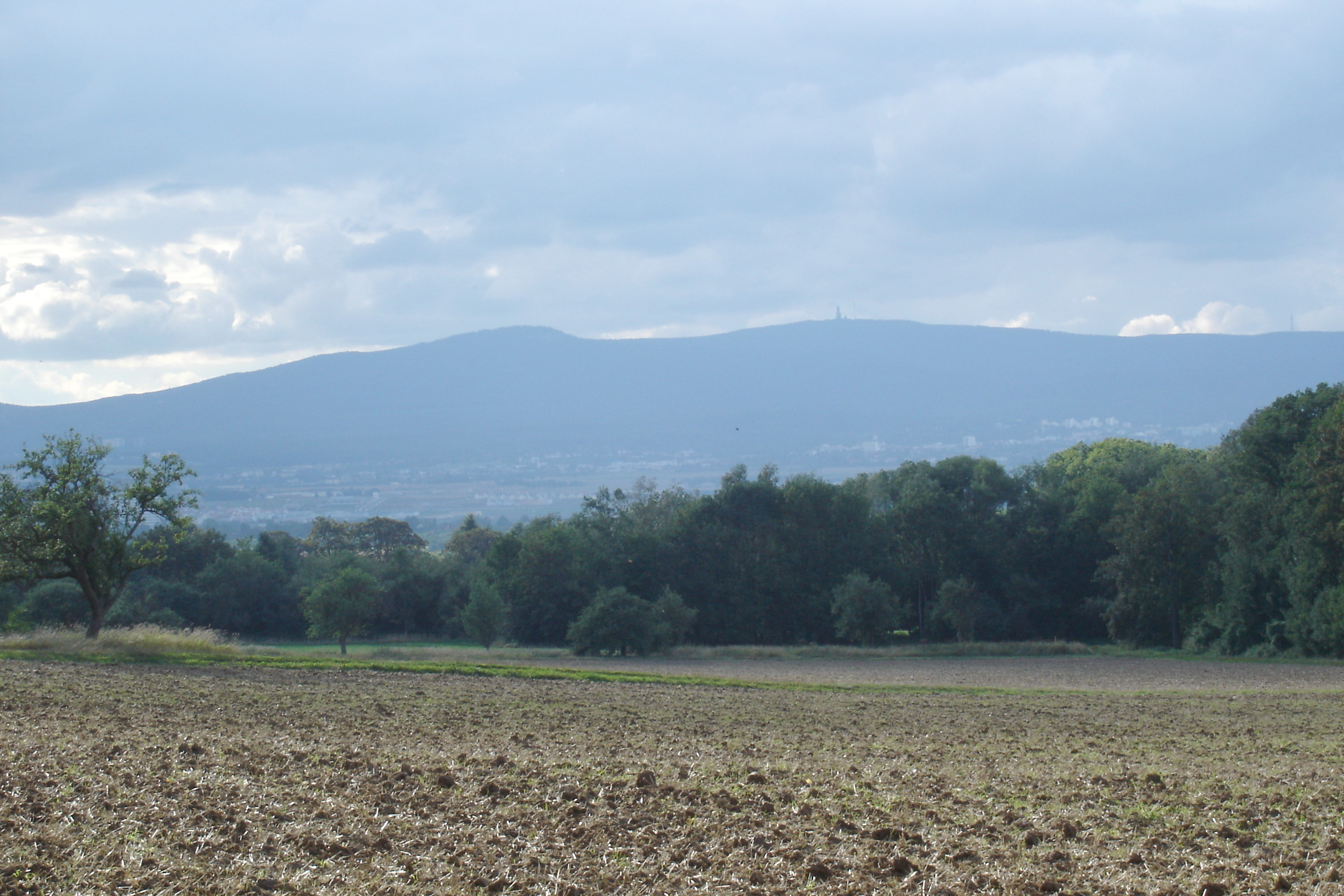 Blick vom höchsten Frankfurter Punkt zur höchsten Taunuserhebung (links Altkönig, rechts Feldberg)